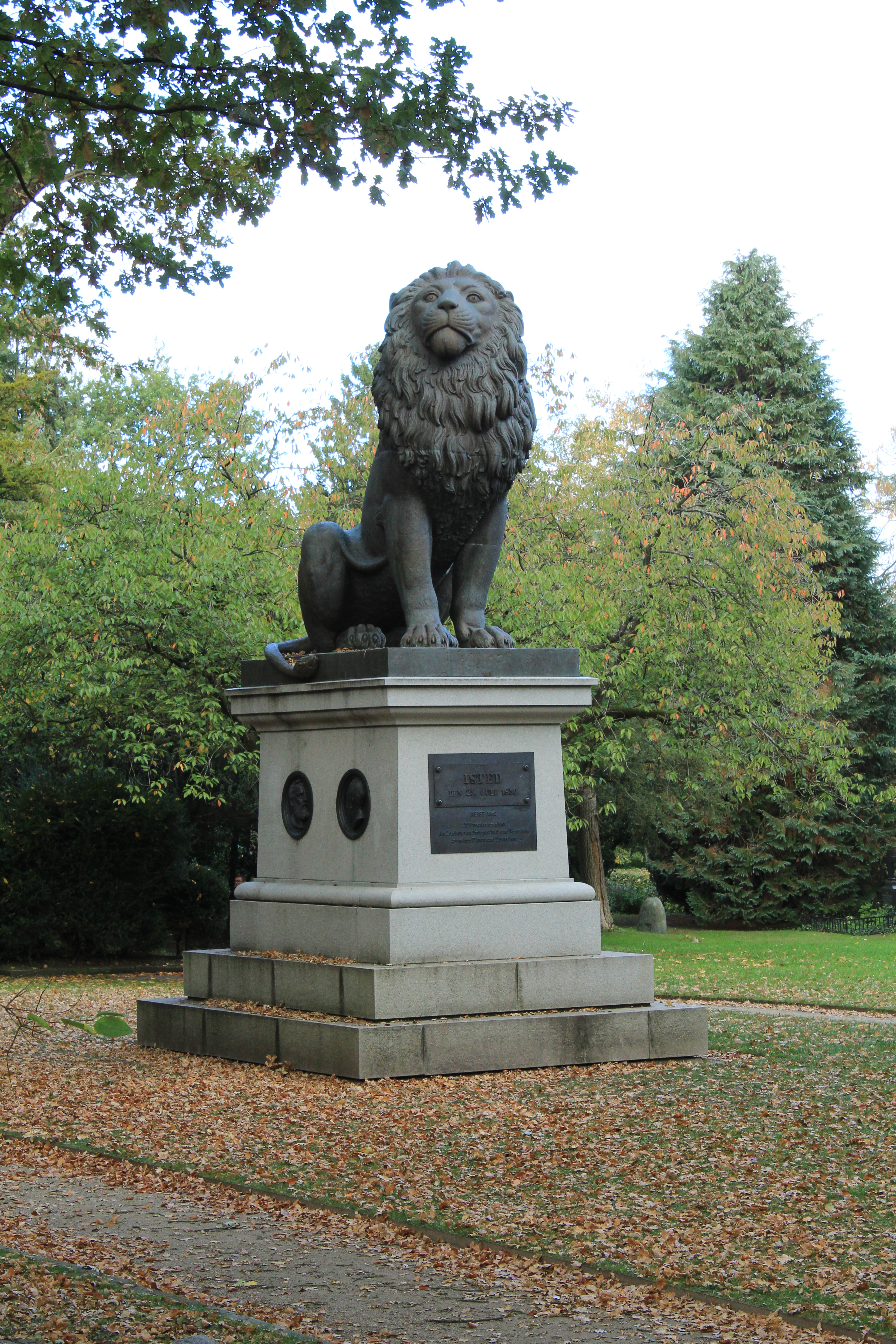 Idstedt-Löwe (2018), hochkant